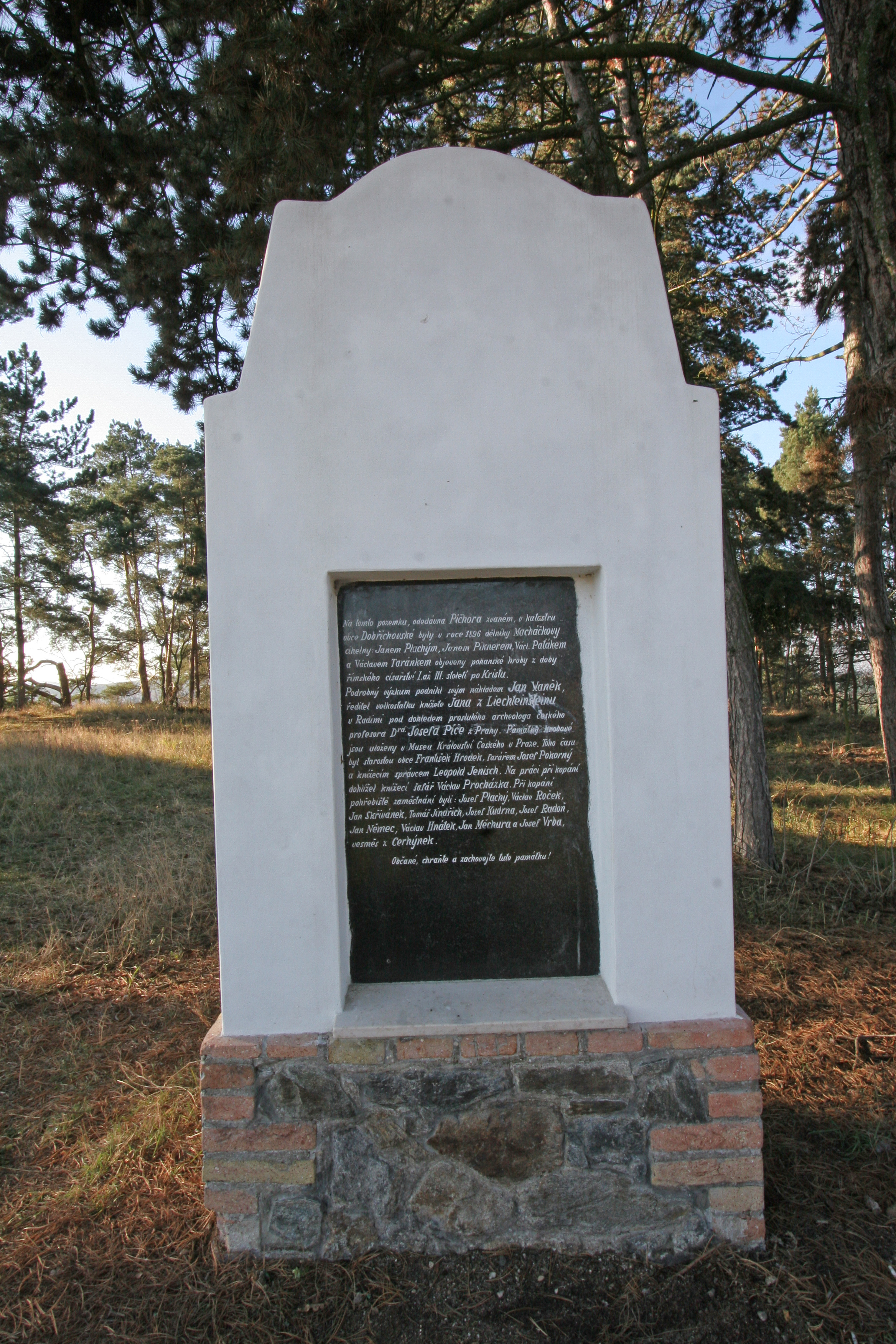 Pohřebiště, archeologické stopy (Dobřichov), Dobřichov